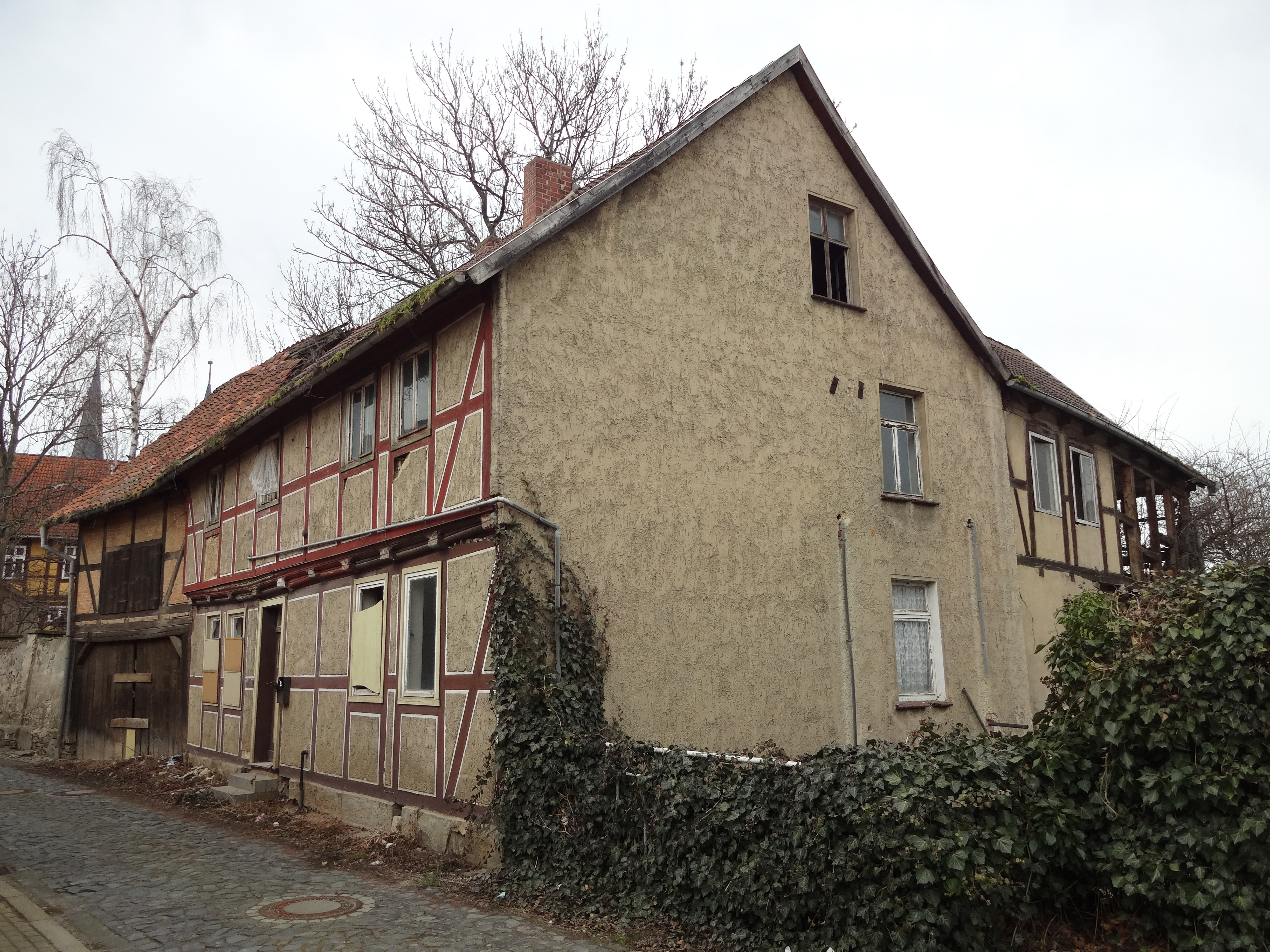 denkmalgeschütztes Fachwerkhaus in der Mühlenstraße 1 in Derenburg